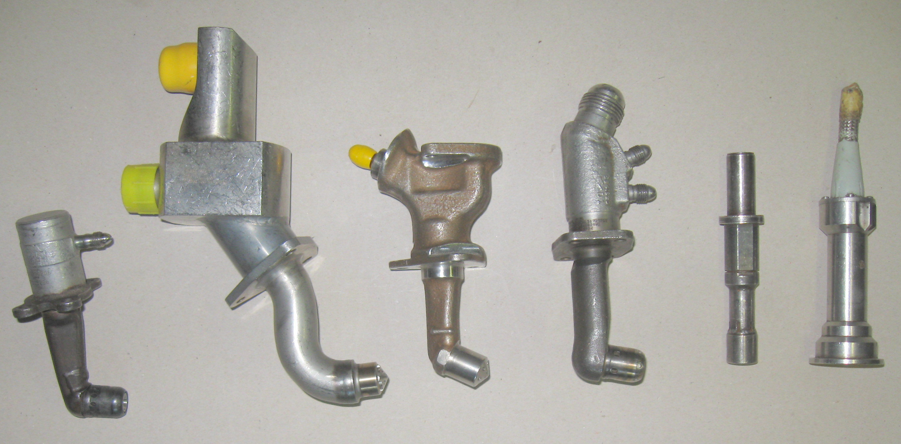 Fuel nozzles of gas turbines